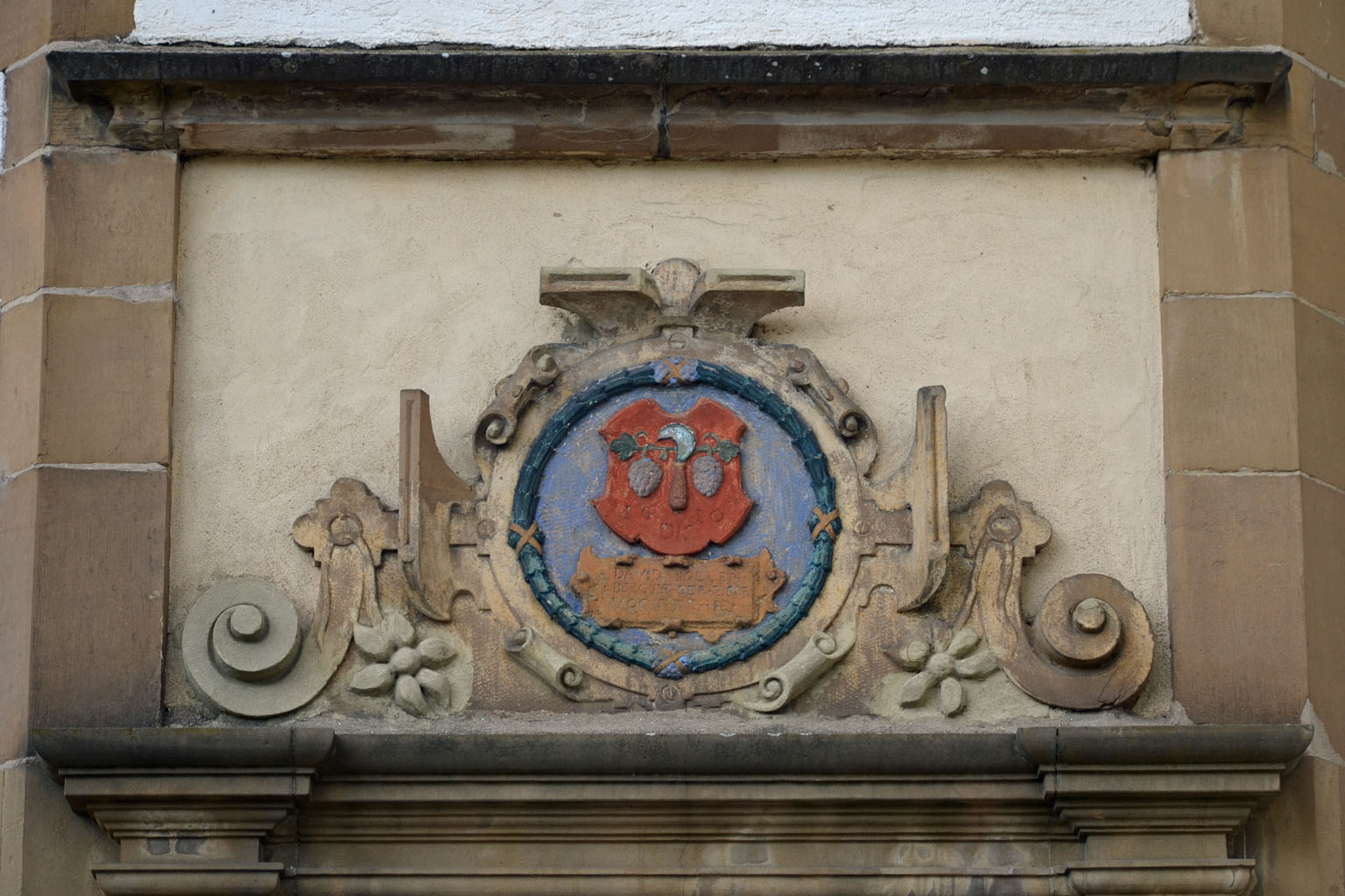 Wappen von David Kollenberger oberhalb des Seitenportals der Pfarrkirche St. Pankratius in Heilbronn-Böckingen.